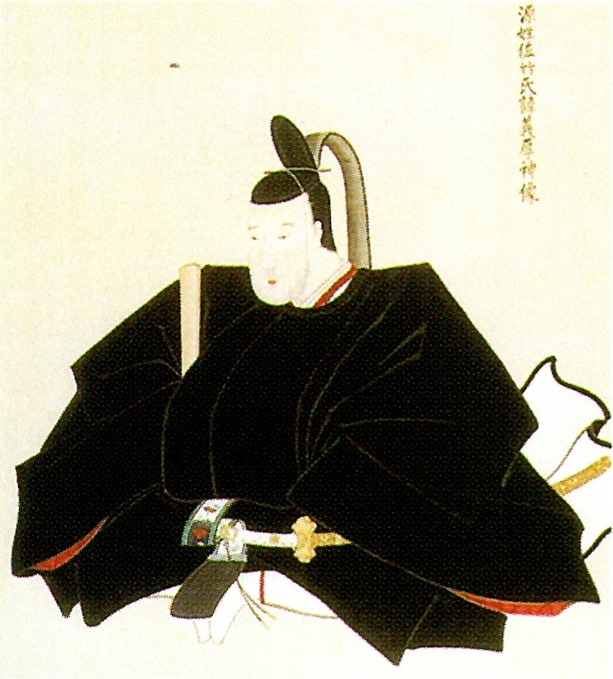 佐竹義厚の肖像。